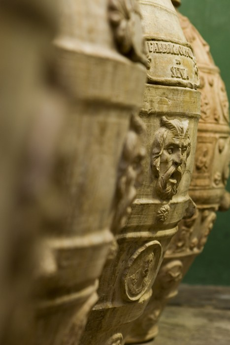 Gli antichi orci dell' azienda agricole Fratelli Palombaro a Monte del Lago, Magione (Pg)- Italia.